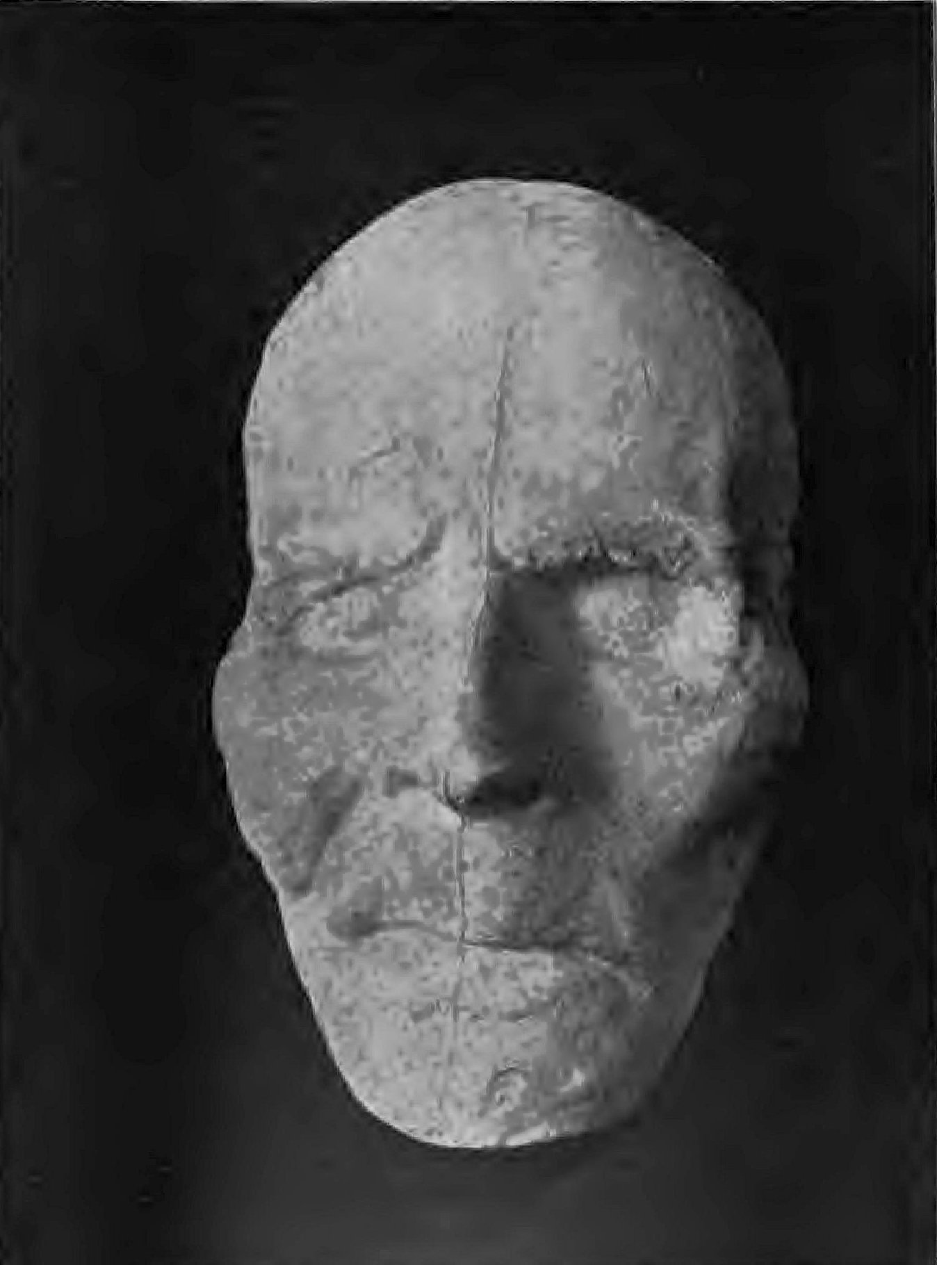 Illuminaten397